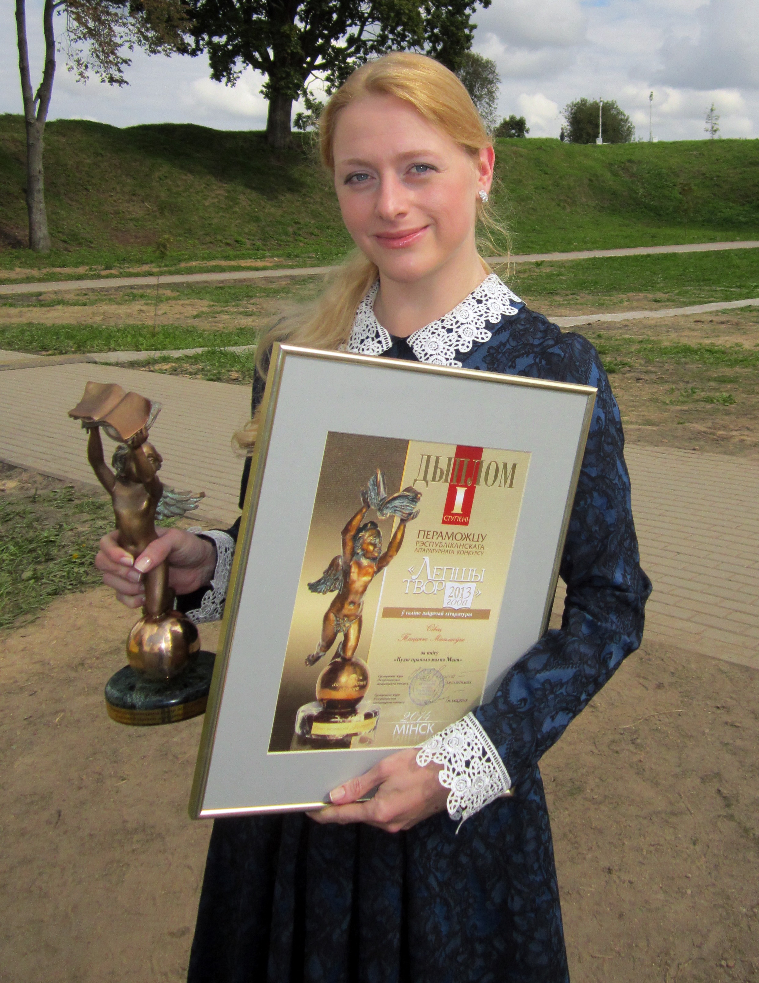 Таццяна Сівец — беларуская журналістка, паэтэса, пісьменніца